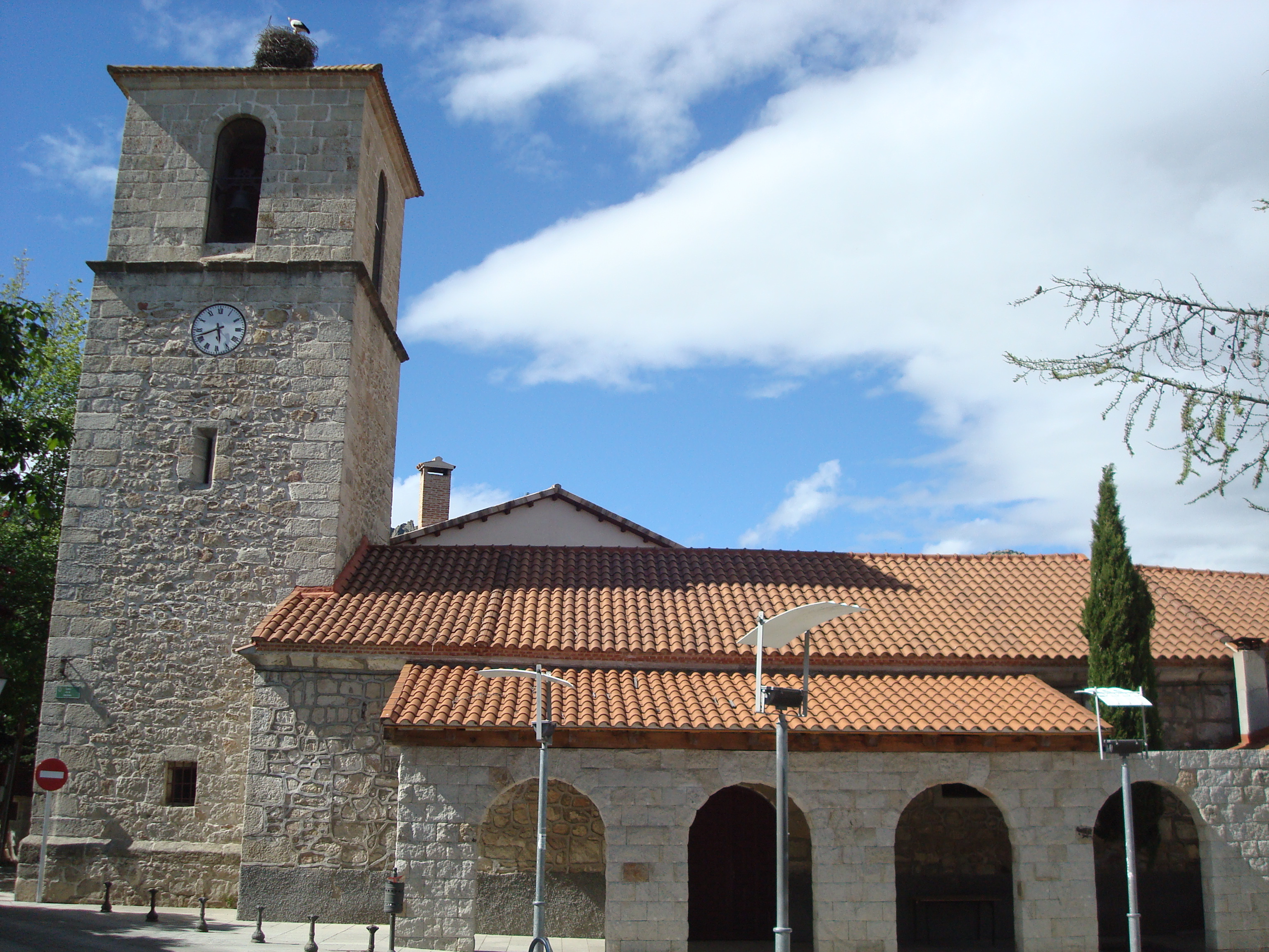 La Cabrera - 001